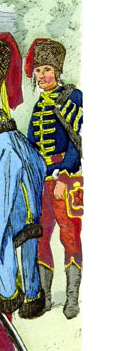 Husdar des Regiments Hadik 1762